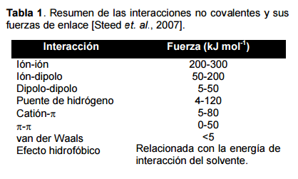 Tabla de fuerzas de interacción no covalentes.